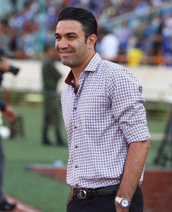 نگاره‌ای از گزارش تصویری دیدار تیم‌های استقلال و فولاد